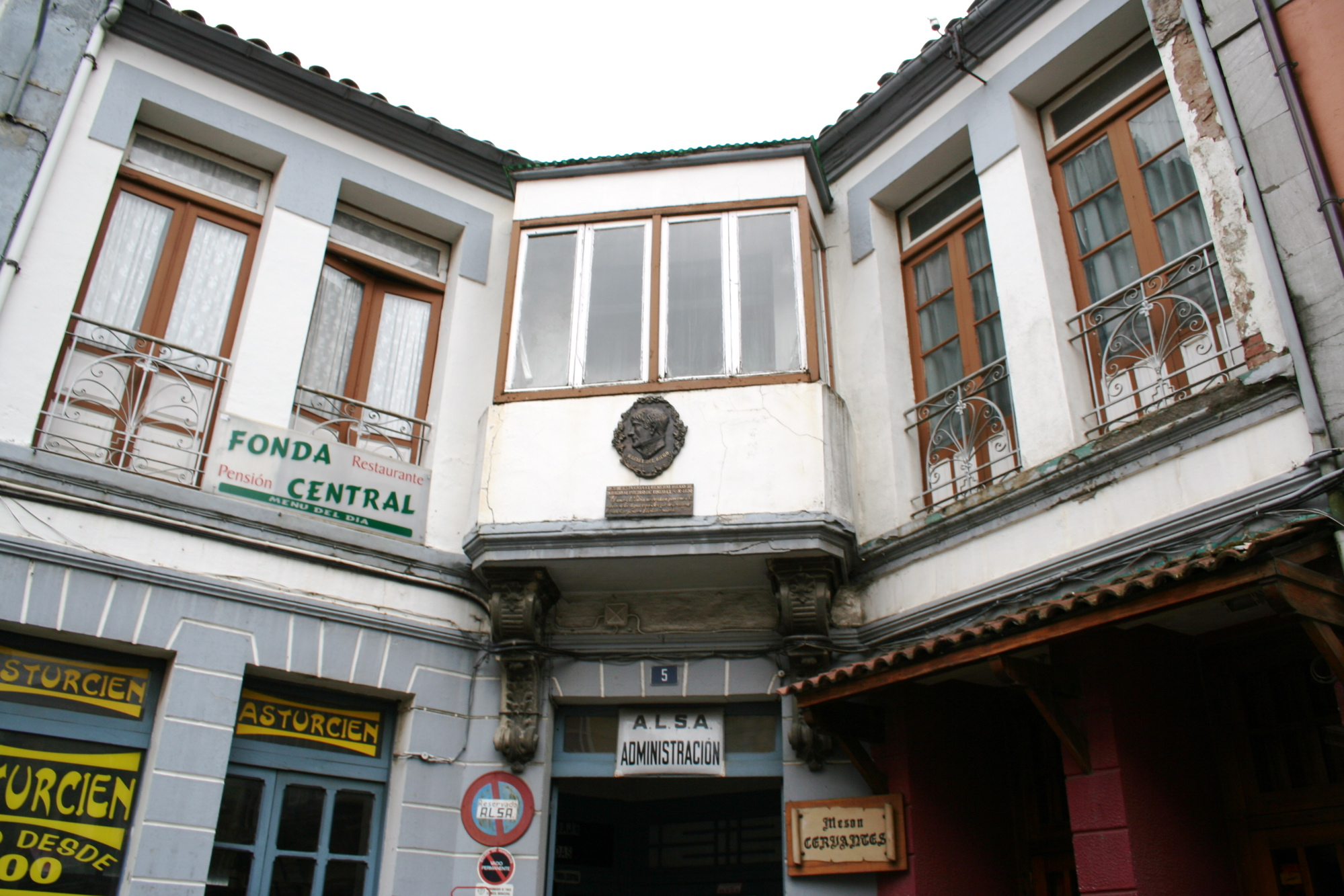 Balcón desde el que el general Rafael del Riego dirigió su famoso discurso al pueblo de Tineo.